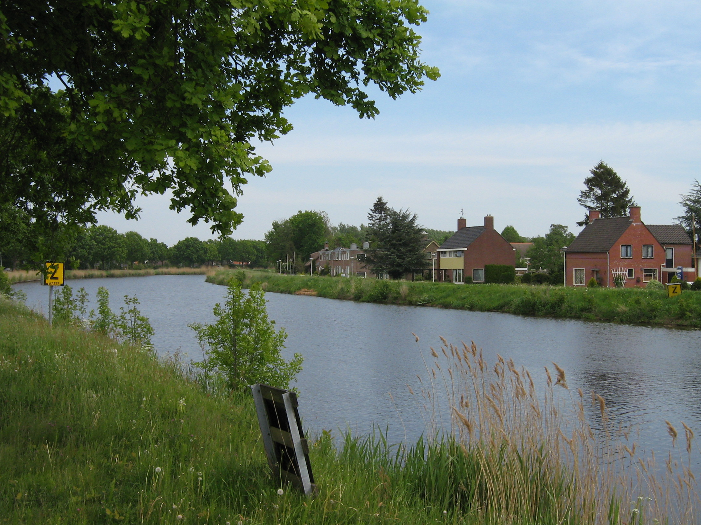 Winschoterdiep canal in Scheemda, the Netherlands